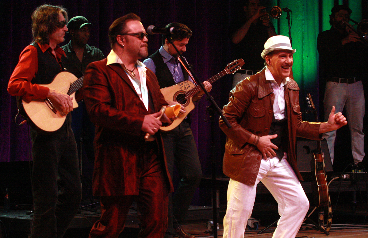 Los Dos y Compañeros